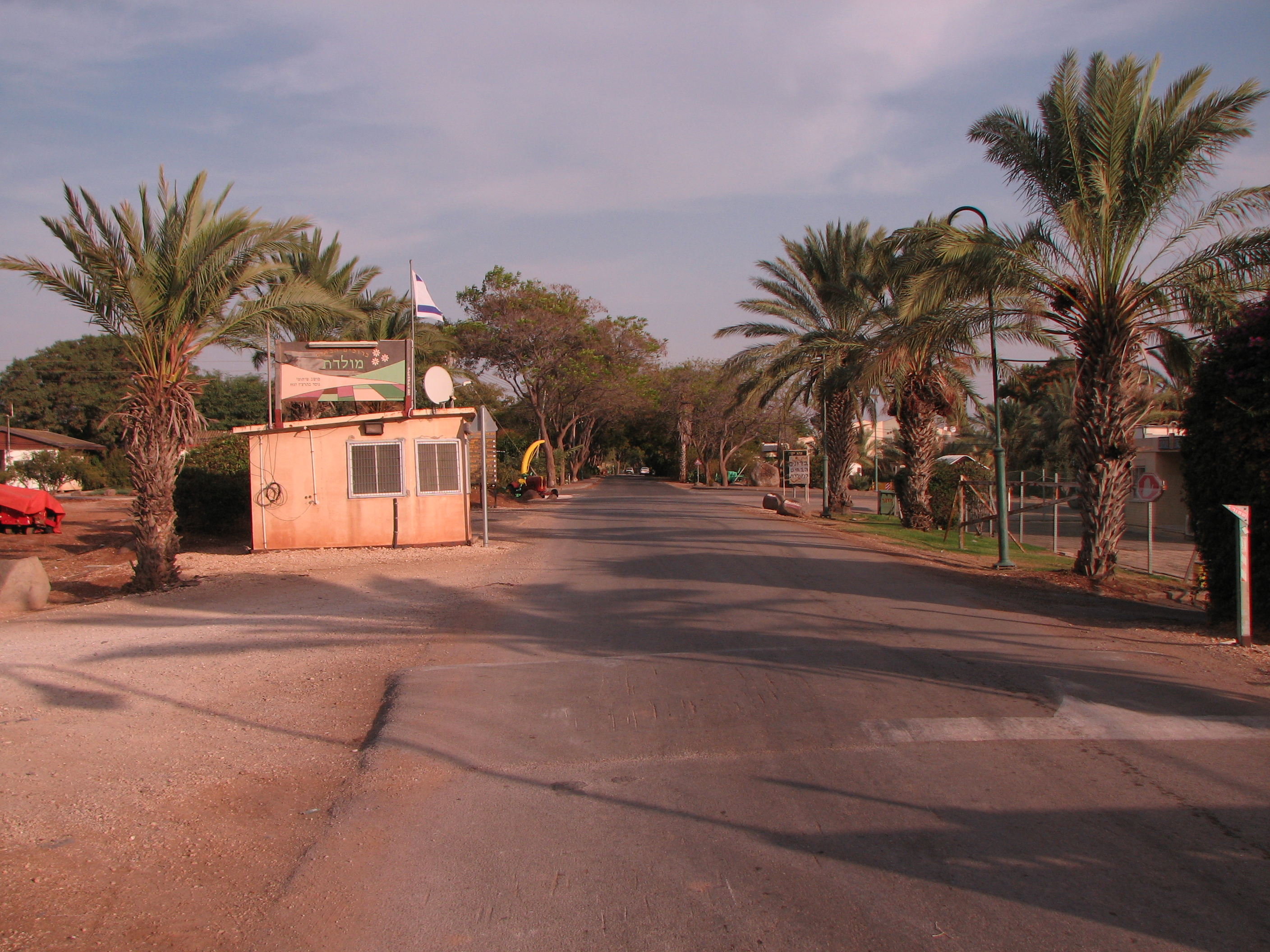 הכניסה למולדת